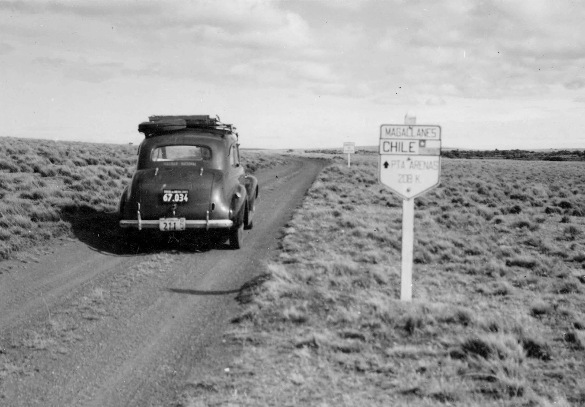 Límite austral de la República Argentina, cerca de Monte Aymond, c. 1940. Un Chevrolet Special Deluxe modelo 1940 recorre la ruta de ripio. Documento Fotográfico. Inventario 40075